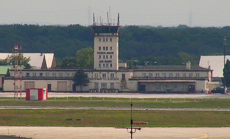 Tower-Gebäude der ehemaligen Rhein-Main Air Base ("Gateway to Europe") der USAF auf der Südseite des Flughafens Frankfurt am Main (die Airbase wurde zum 31.12.2005 geschlossen). Foto: Wolfgang Pehlemann, Wiesbaden, Germany, 0ICT0080